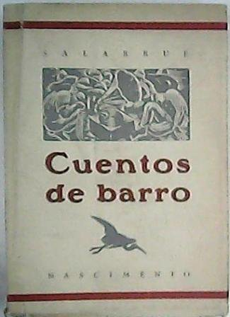 En 1933-1934, gracias a donaciones, Salarrué publicó su obra más conocida: CUENTOS DE BARRO. Debió ser una trilogía con TRASMALLO y ESO Y MÁS, ilustrada por su amigo José Mejía Vides, pero nunca tuvo la oportunidad editorial de ver esos tres volúmenes juntos